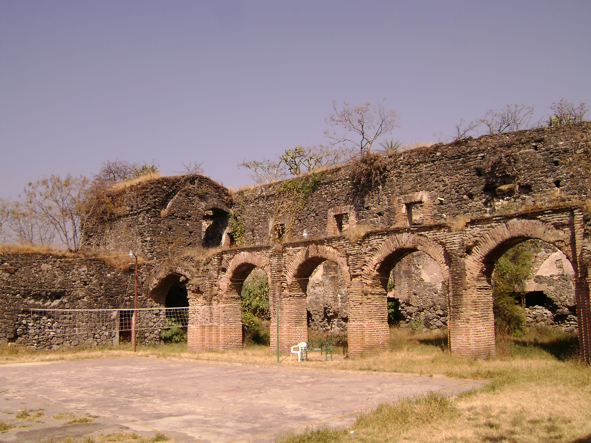 VISTA DE LAS RUINAS DEL EXHOSPITAL DE LA SANTA CRUZ EN OAXTEPEC, MORELOS, MEXICO